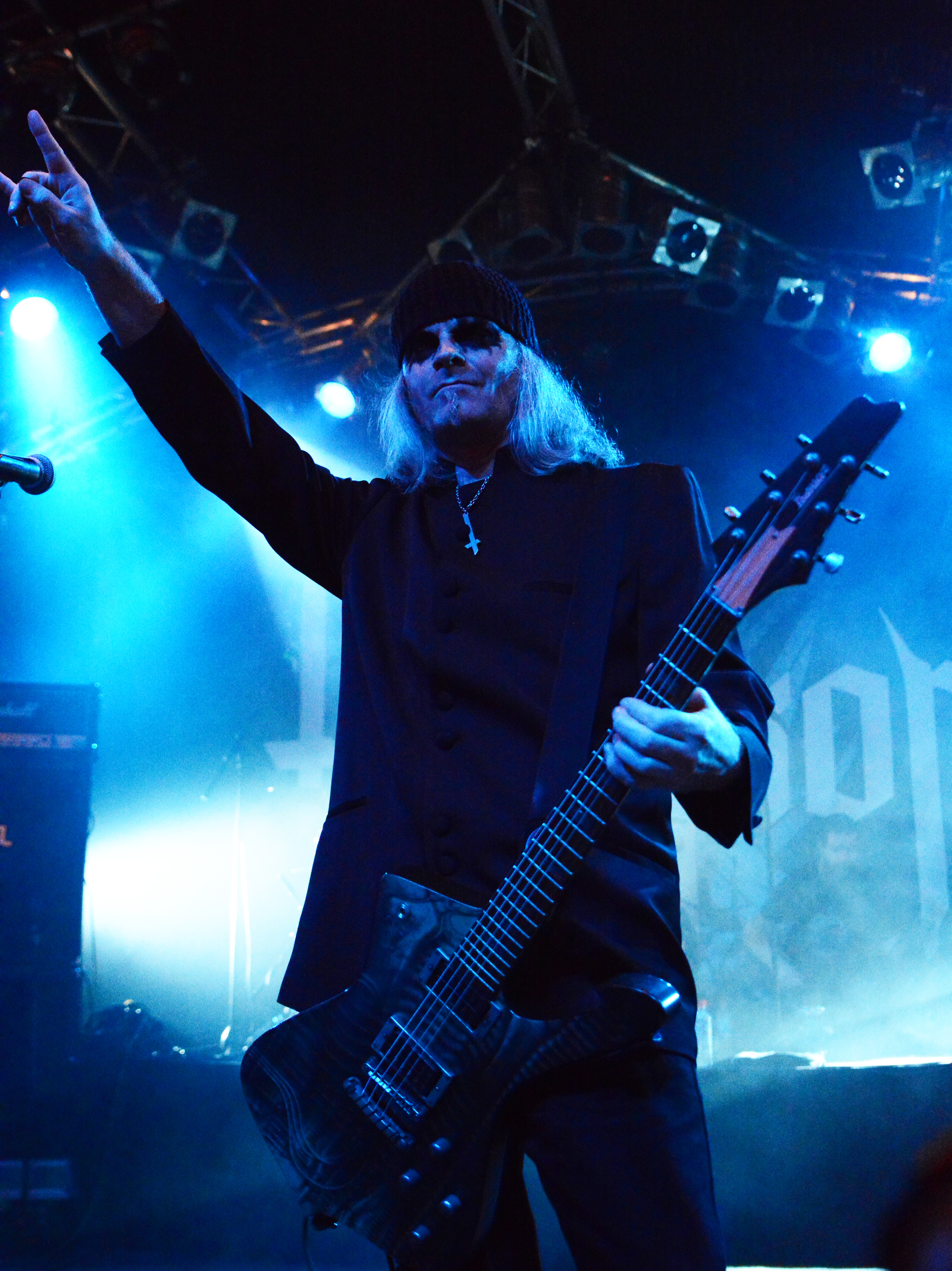 Triptykon bei den Hamburg Metal Dayz 2015